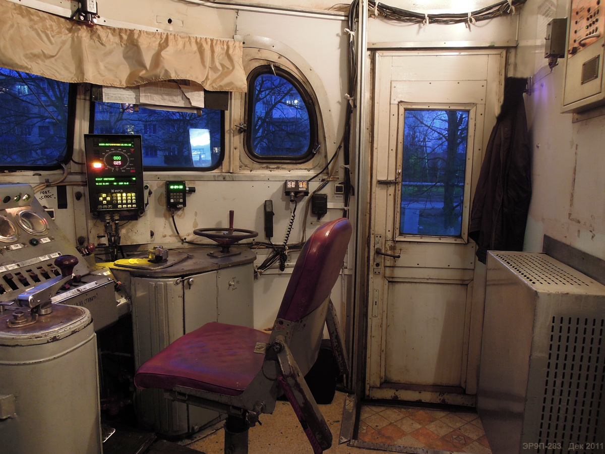 Кабина электропоезда ЭР9П-283 (ЭР9ПК-283), Северо-Кавказская железная дорога.